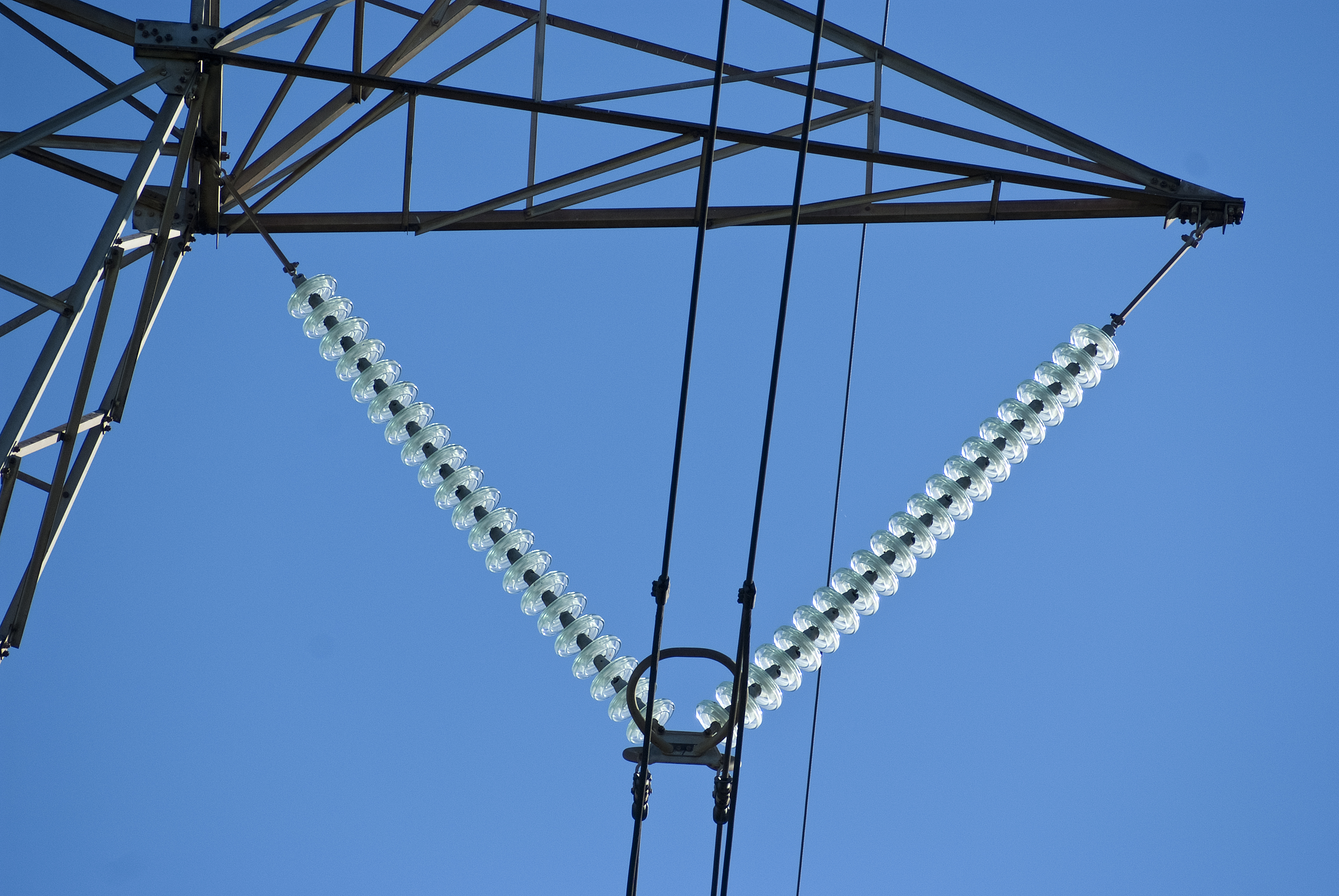 Linea di trasmissione